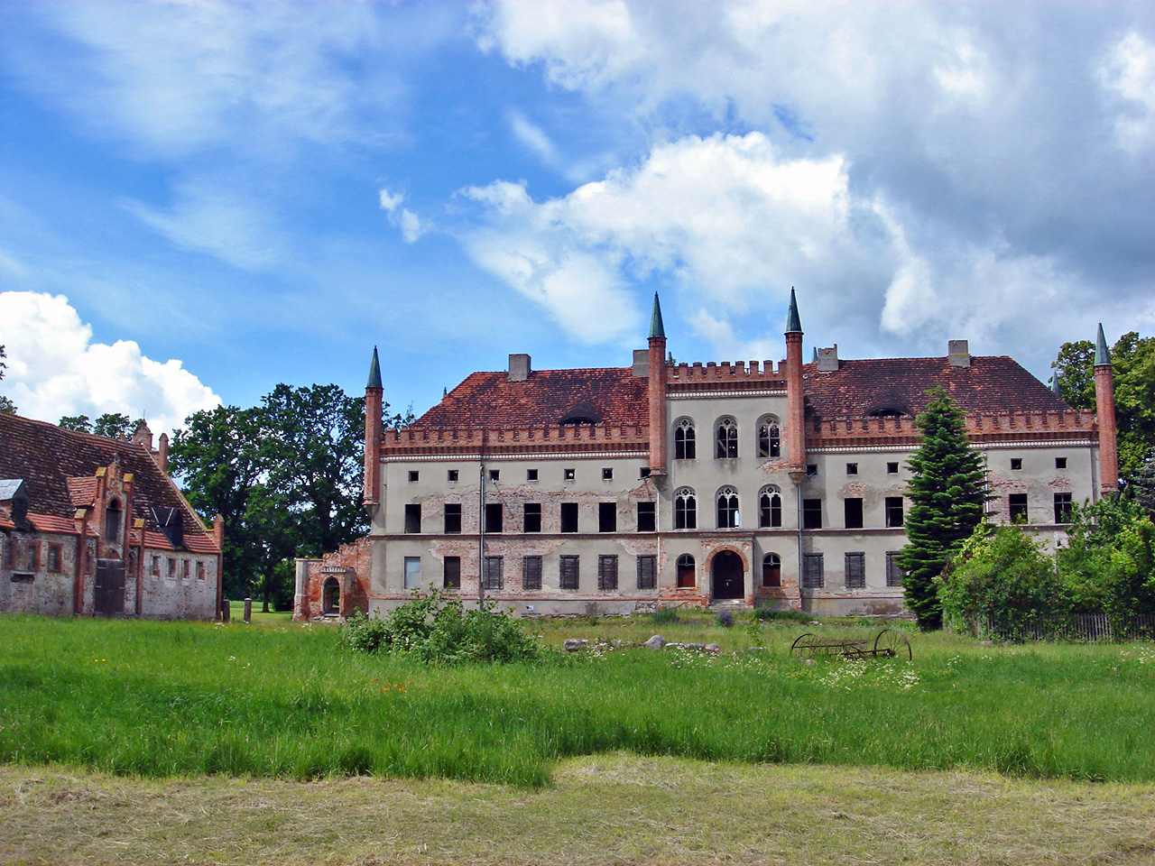 Schloss Broock, Gemeinde Alt Tellin, Landkreis Demmin, Mecklenburg-Vorpommern, seit 1980 ungenutzt verfallend